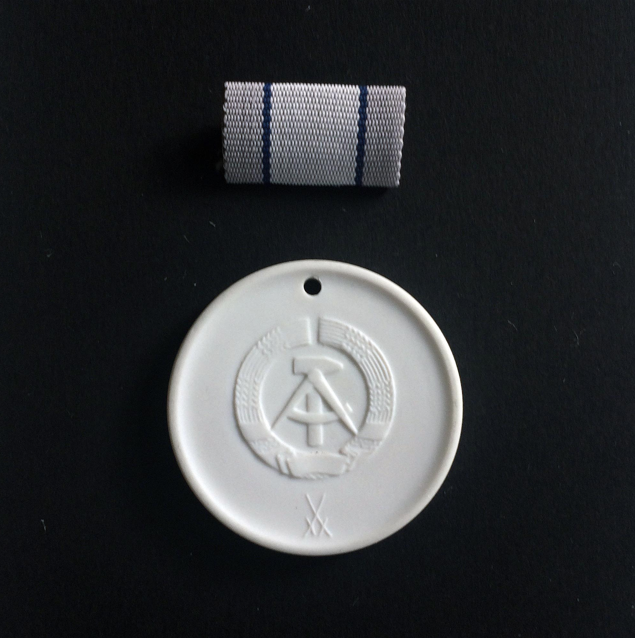 Medaille „Gutes Design“, Kleine Ausführung mit Ordensspange, Vorderseite, DDR, 1980, Meißner Porzellan